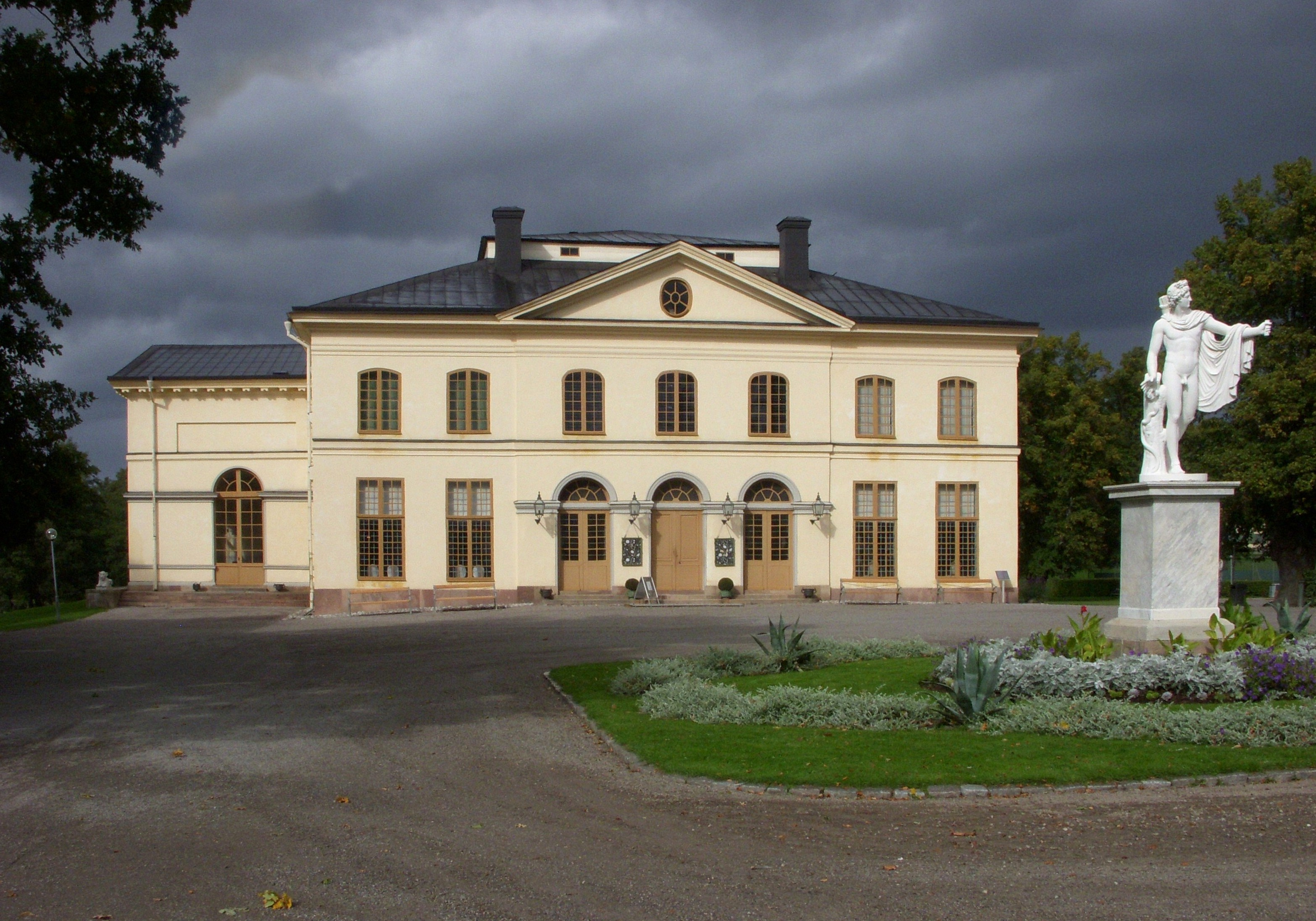 Drottningholms slottsteater, fasad mot syd